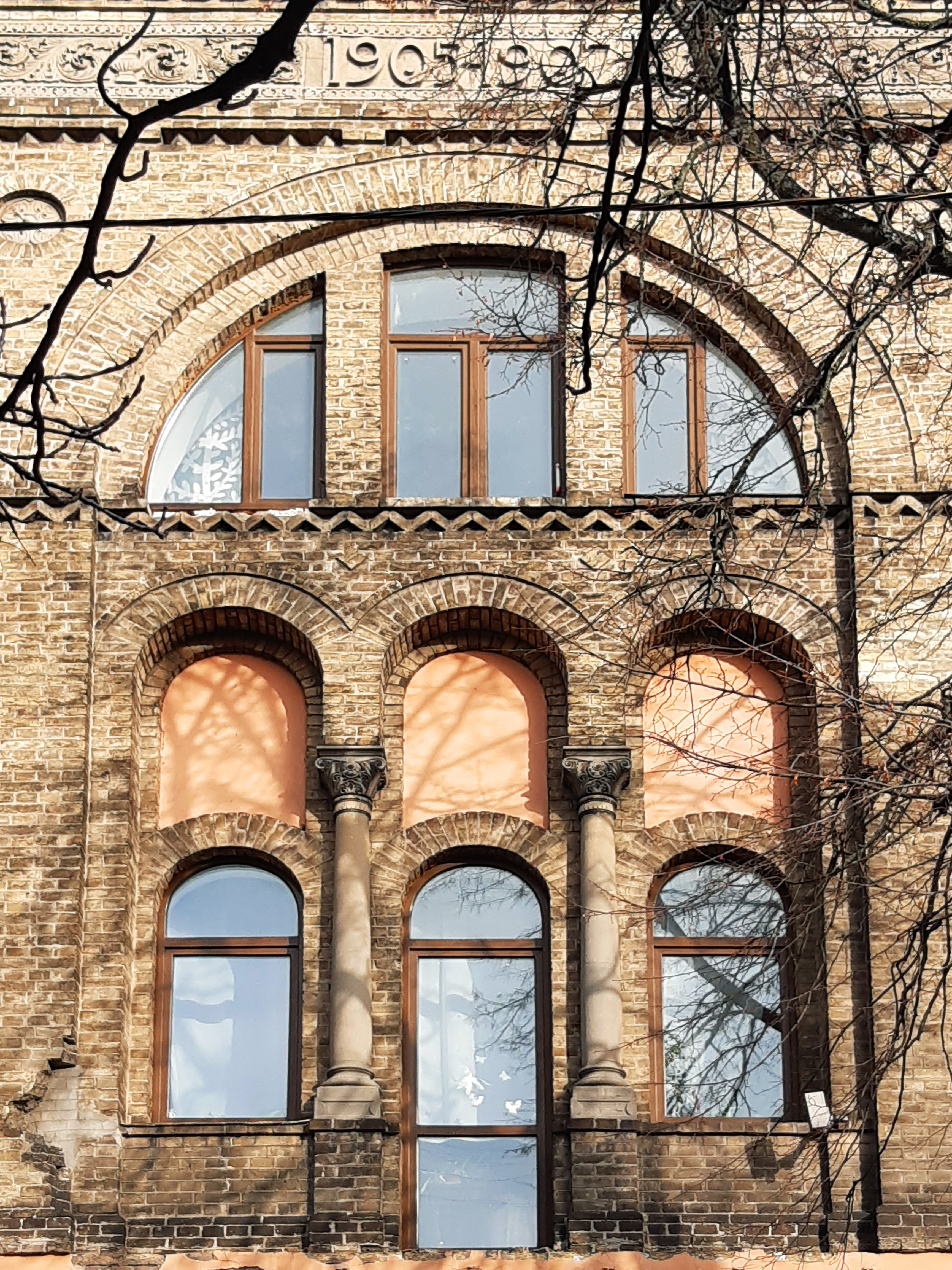 Будинок колишнього Міського парафіяльного училища імені Терещенка, Київ, вул. Ярославів Вал, 40